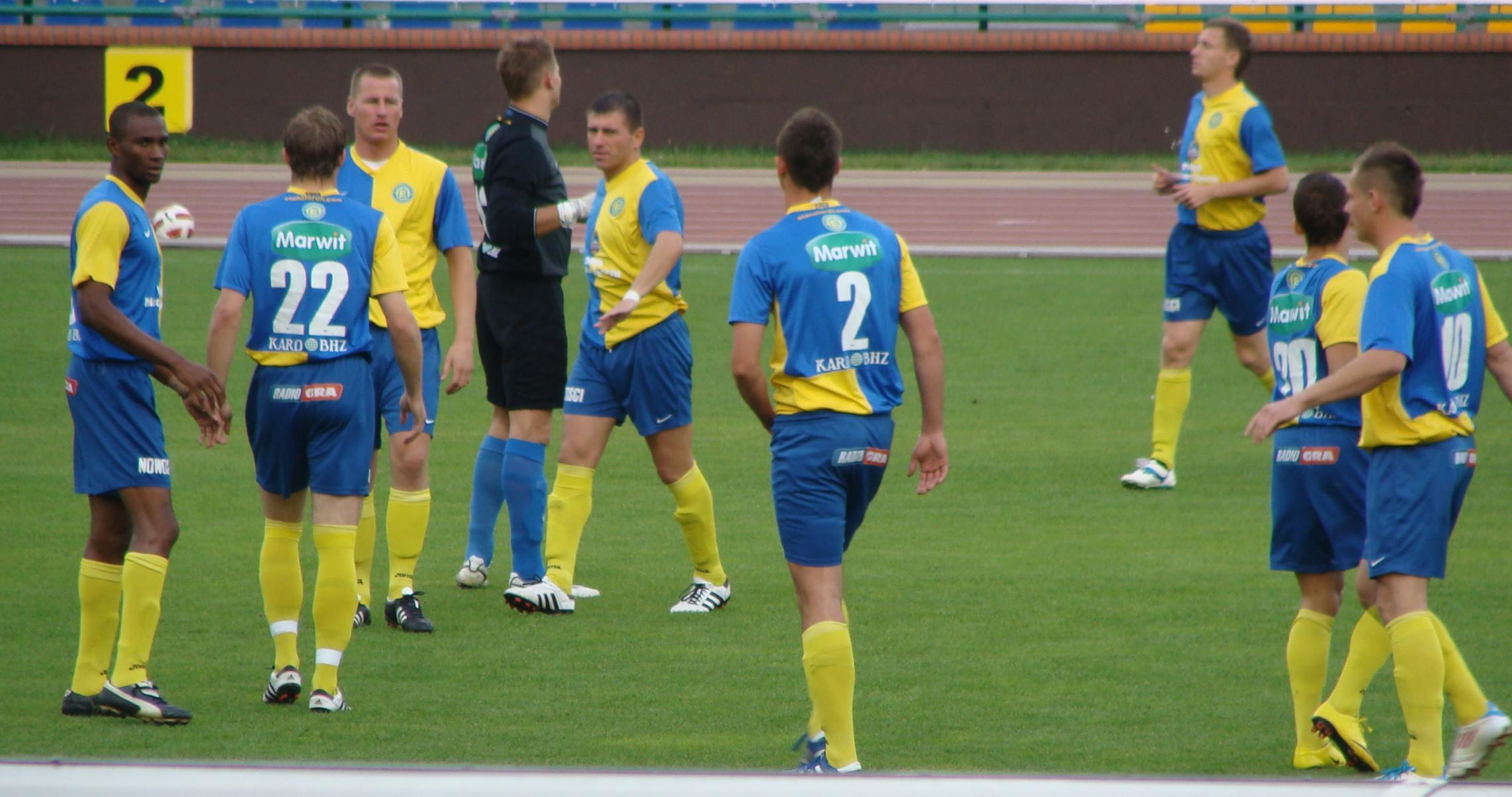 Mecz II ligi (grupy zachodniej) Elana Toruń - Chrobry Głogów